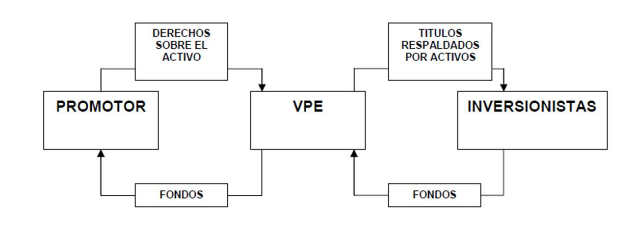 Esquema del proceso de Bursatilización de Activos